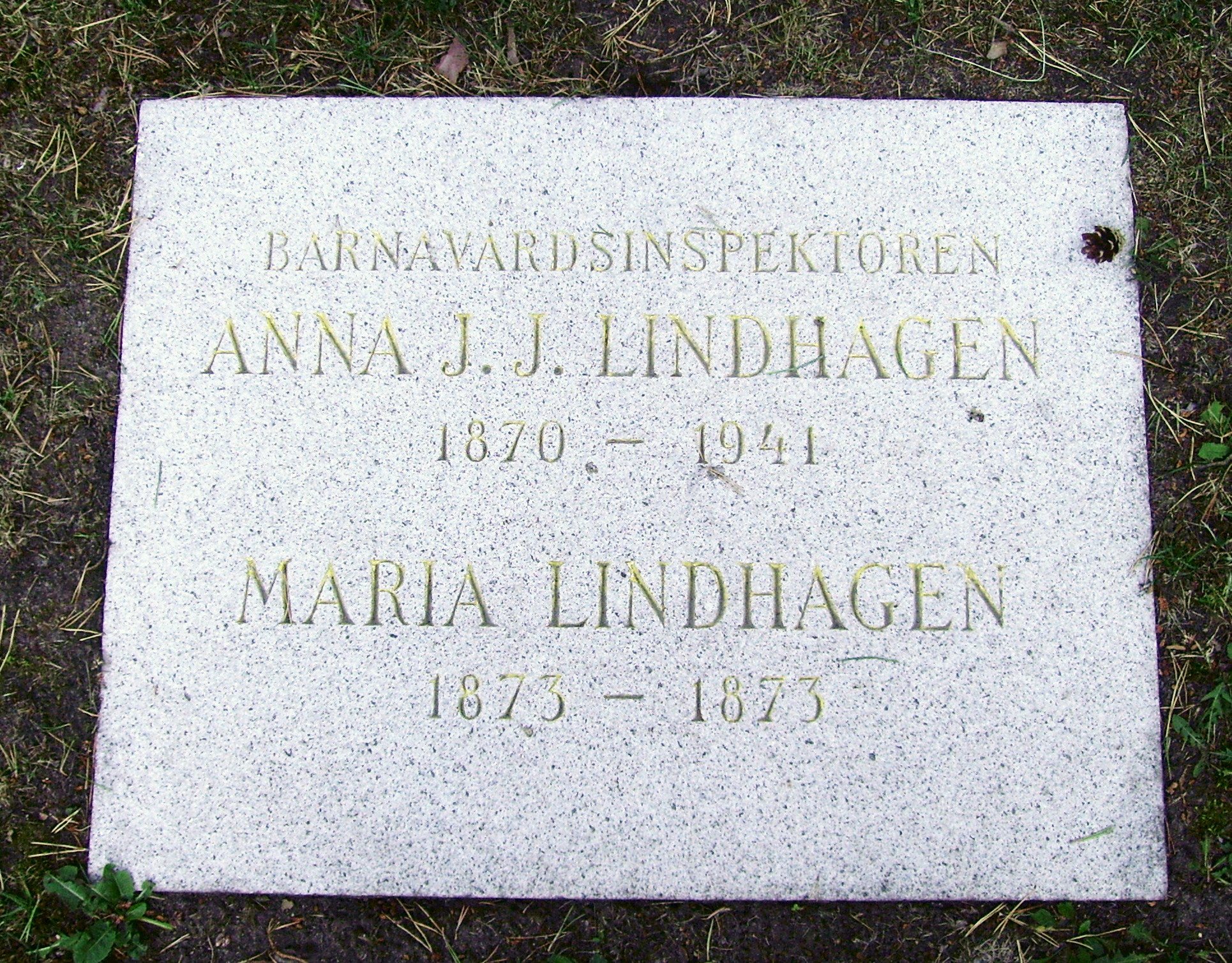 Picture of Anna Lindhagen's grave at Norra begravningsplatsen in Solna.